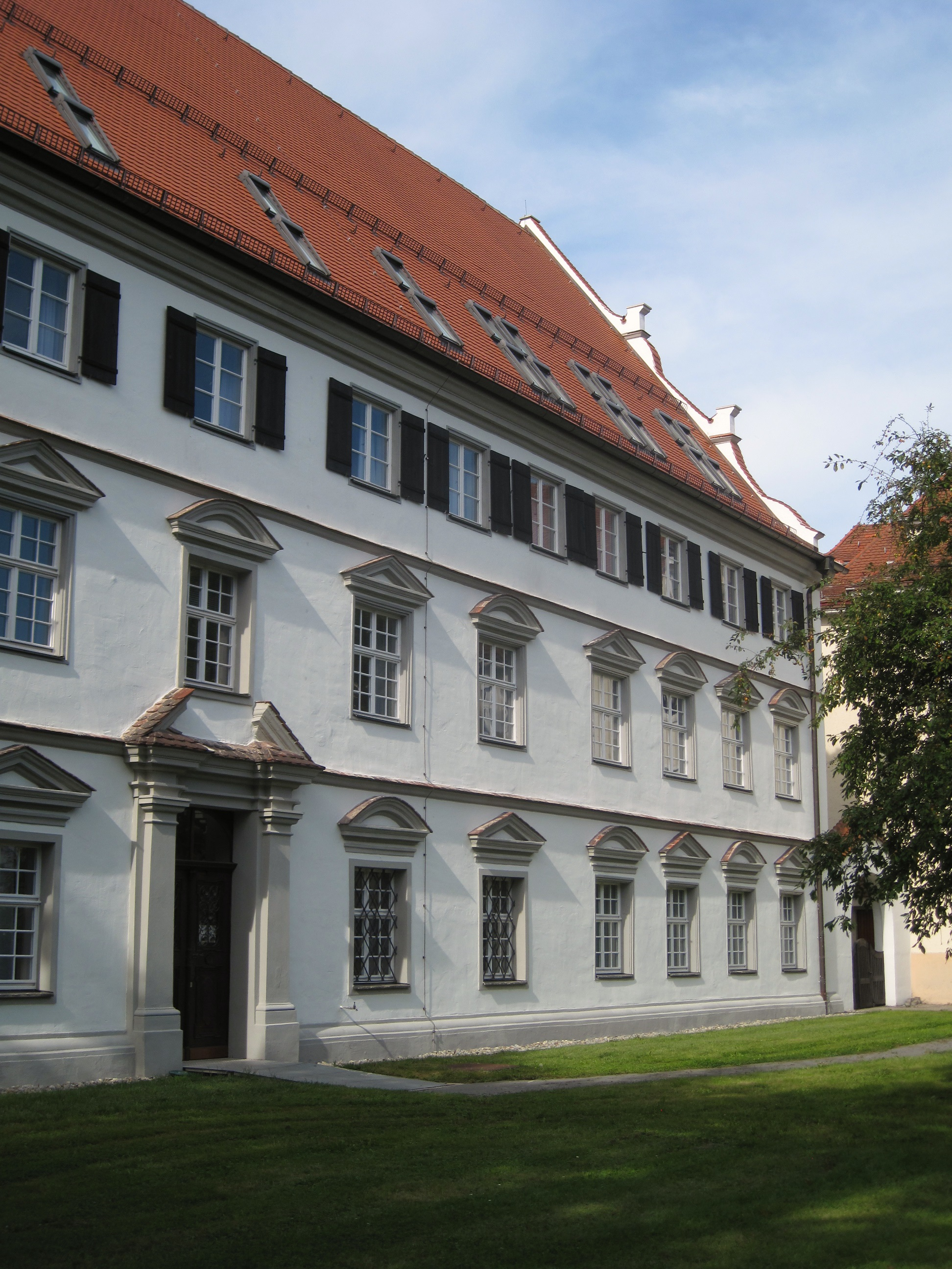 Amtsgericht Biberach an der Riß, Alter Postplatz 4 in Biberach an der Riß.